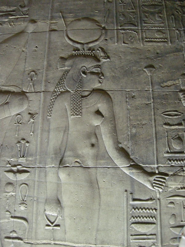 Rappresentazione di Isis nel tempio di File ad Assuan (Egitto)